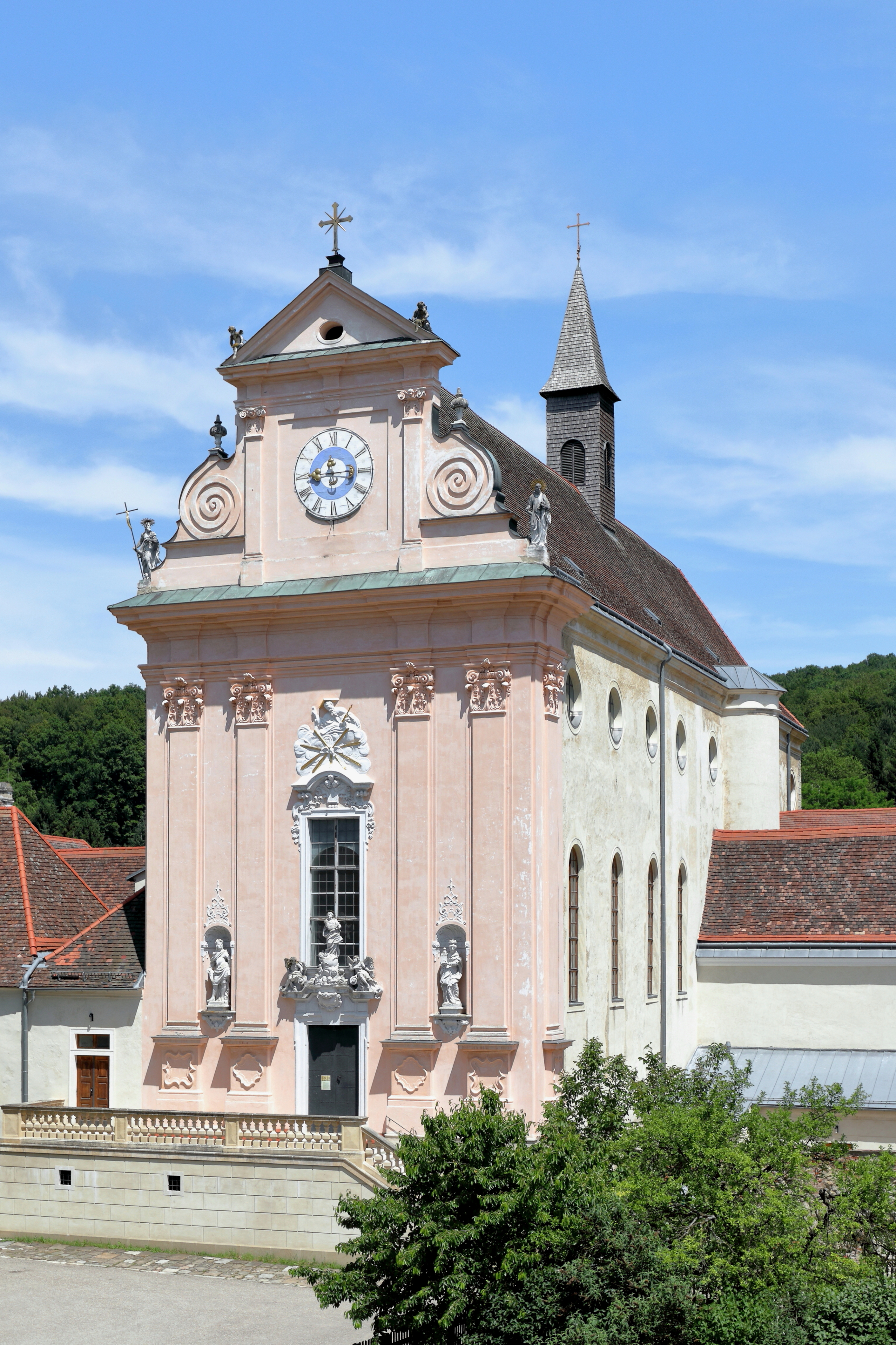 Die ehemalige Klosterkirche der 1782 aufgelösten Kartause in der niederösterreichischen Marktgemeinde Mauerbach. Die Klosterkirche wurde ab etwa 1616 neu gebaut, 1683 zerstört und nachher wieder instandgesetzt.